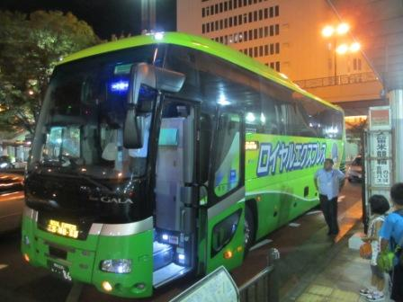 西鉄久留米駅東口バス停に停車中のロイヤルバス